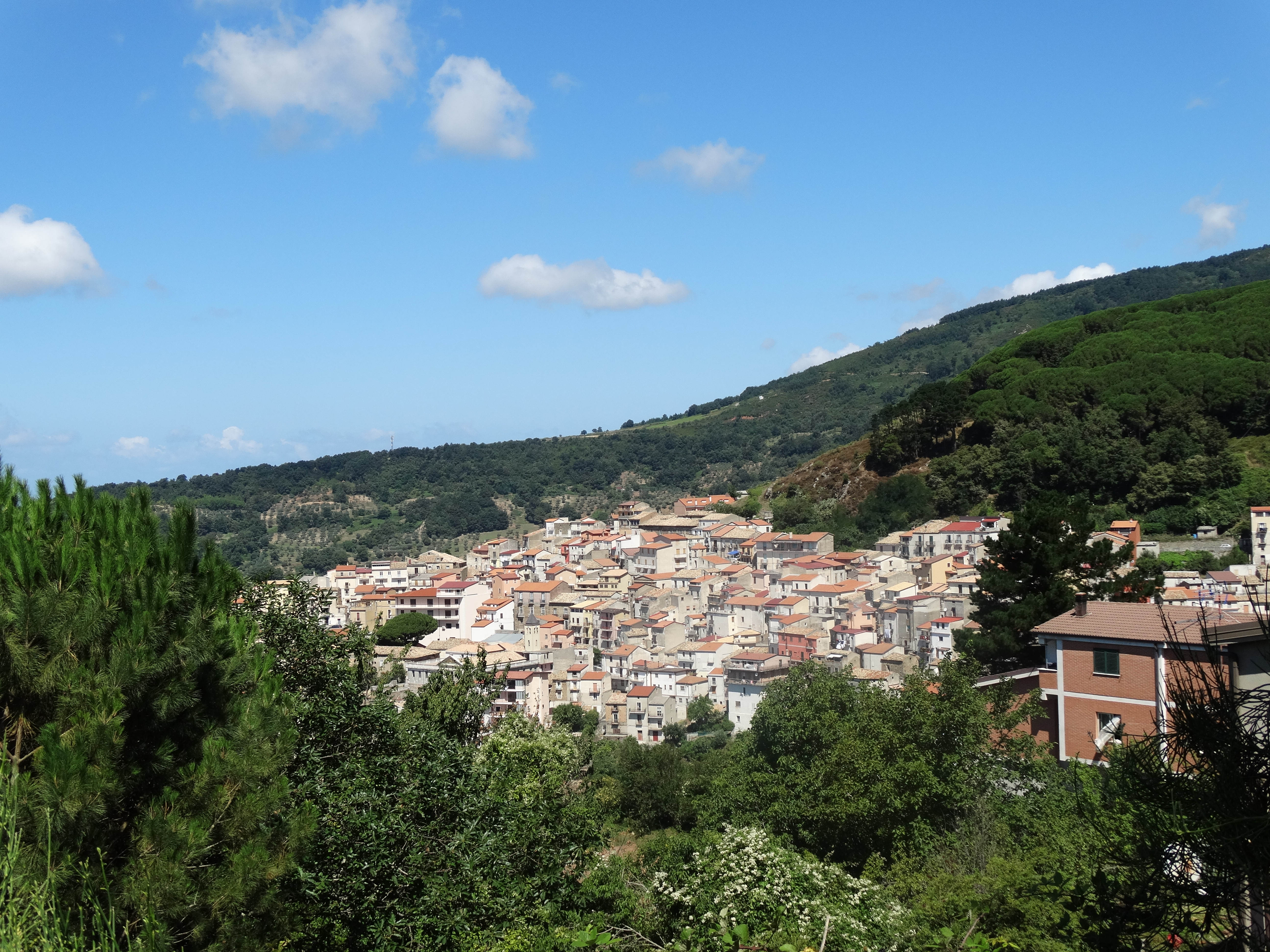 vue de Gizzeria